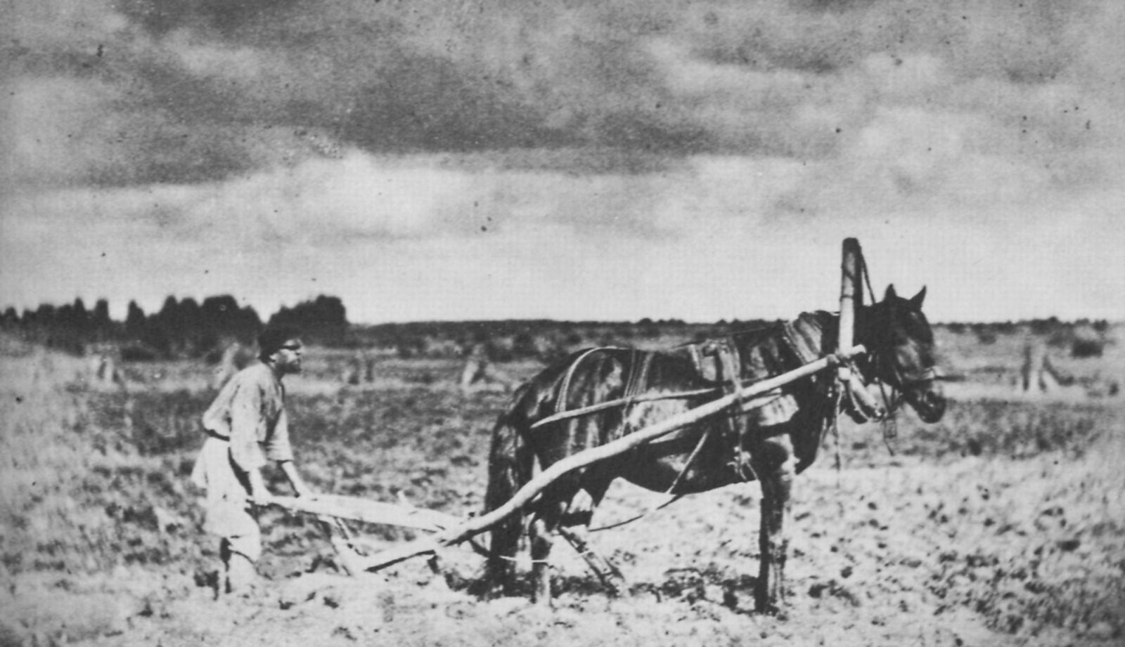 Russischer Photograph: Pflügen mit dem traditionellen Holzpflug (socha)